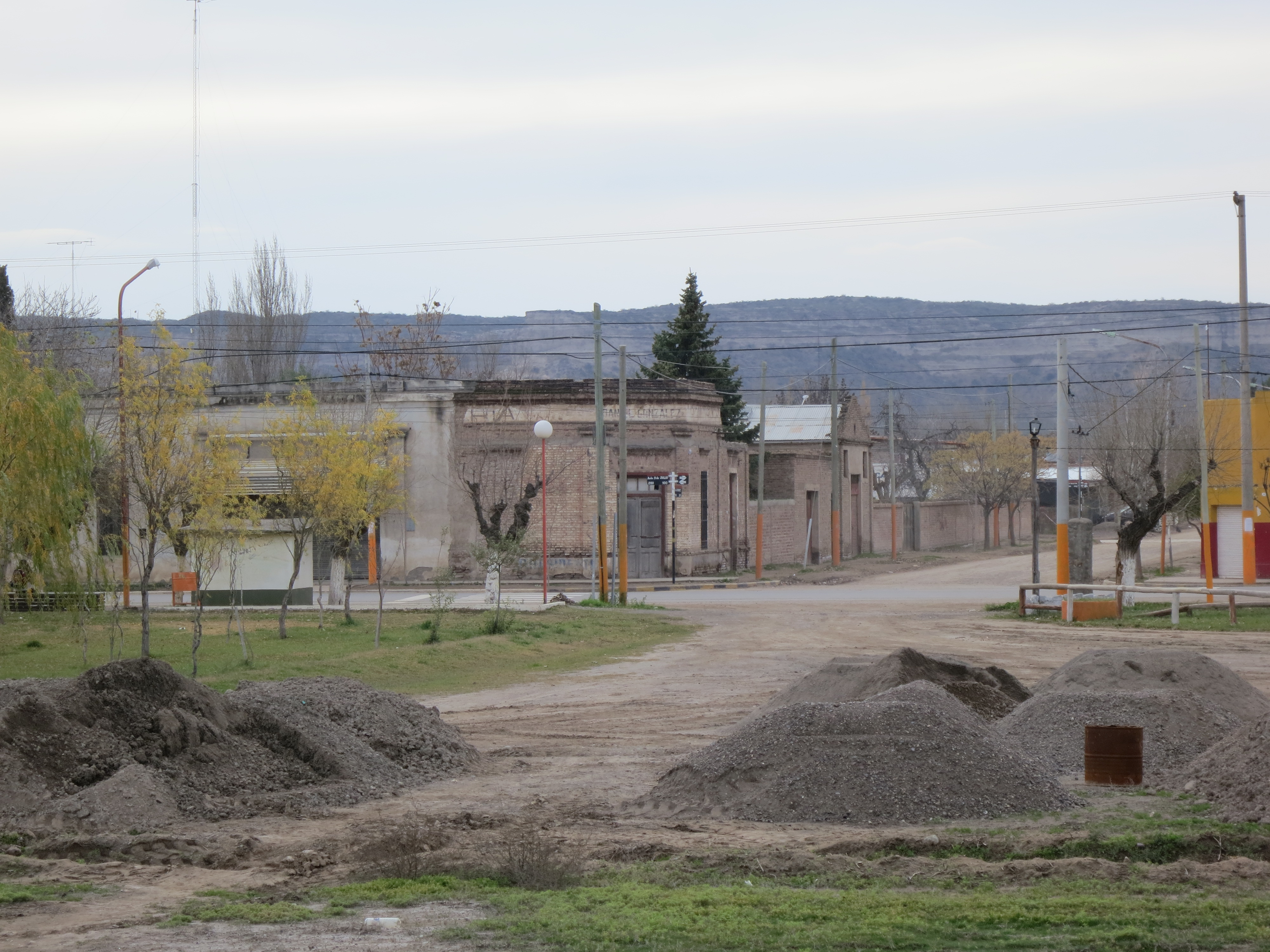 godoy - vista desde la estacion